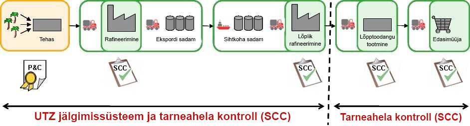 Skeem Säästliku Palmiõli Ümarlaua kontrollist tarneahelas